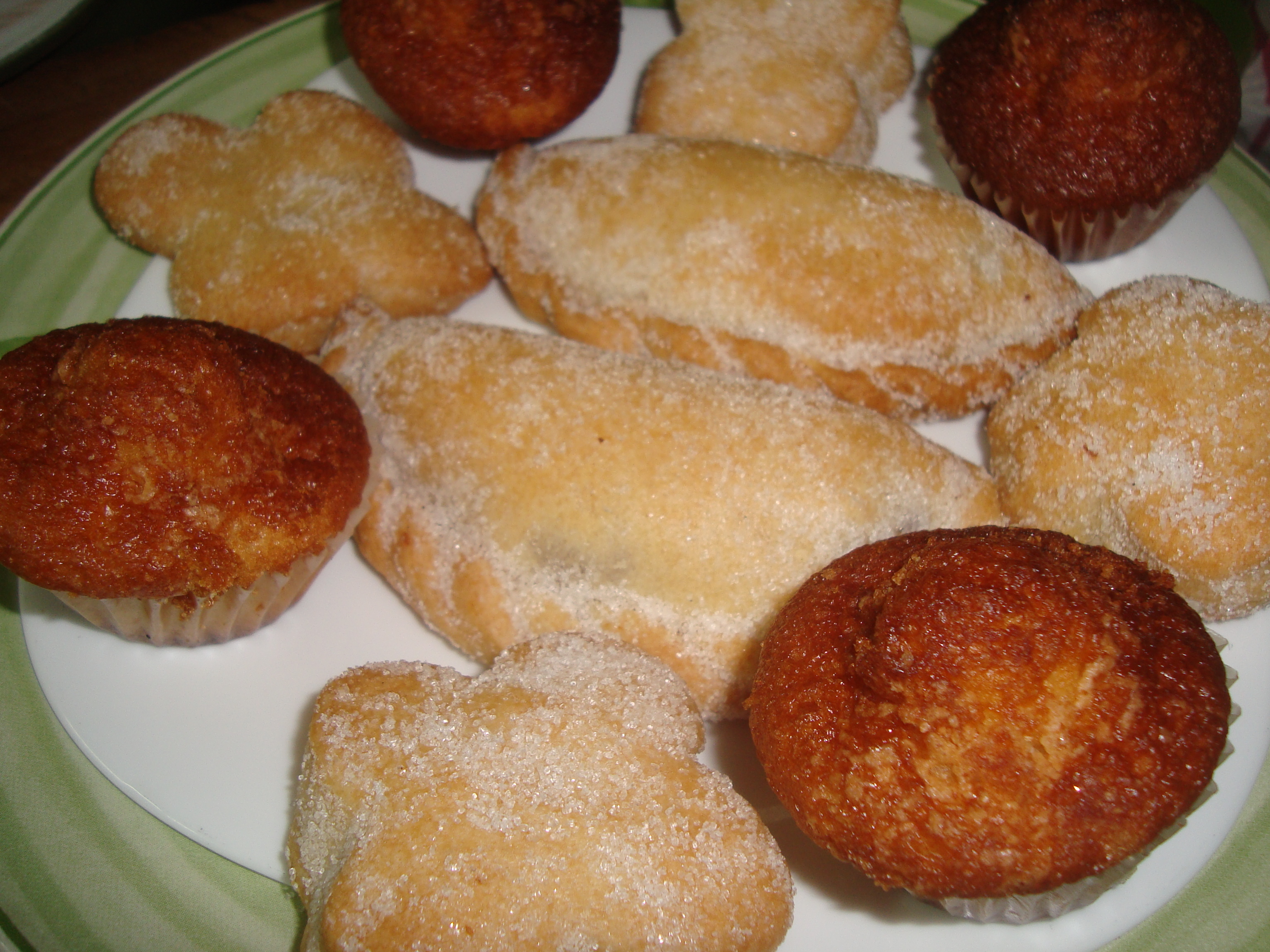 Repostería típica de la comarca dels Ports de Morella: coquetes, corets, almendrados, mostaxons, magdalenes, rollets, carquiñols....